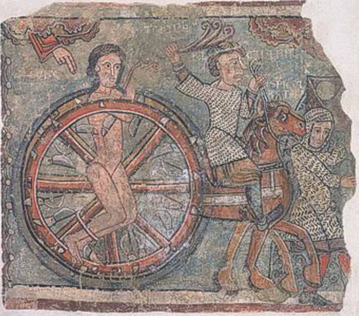 Pintura mural procedente de la catedral de la Seu d'Urgell, Título: El martirio de santa Catalina, en la actualidad en la fundación Abegg Stiftungde de Suiza